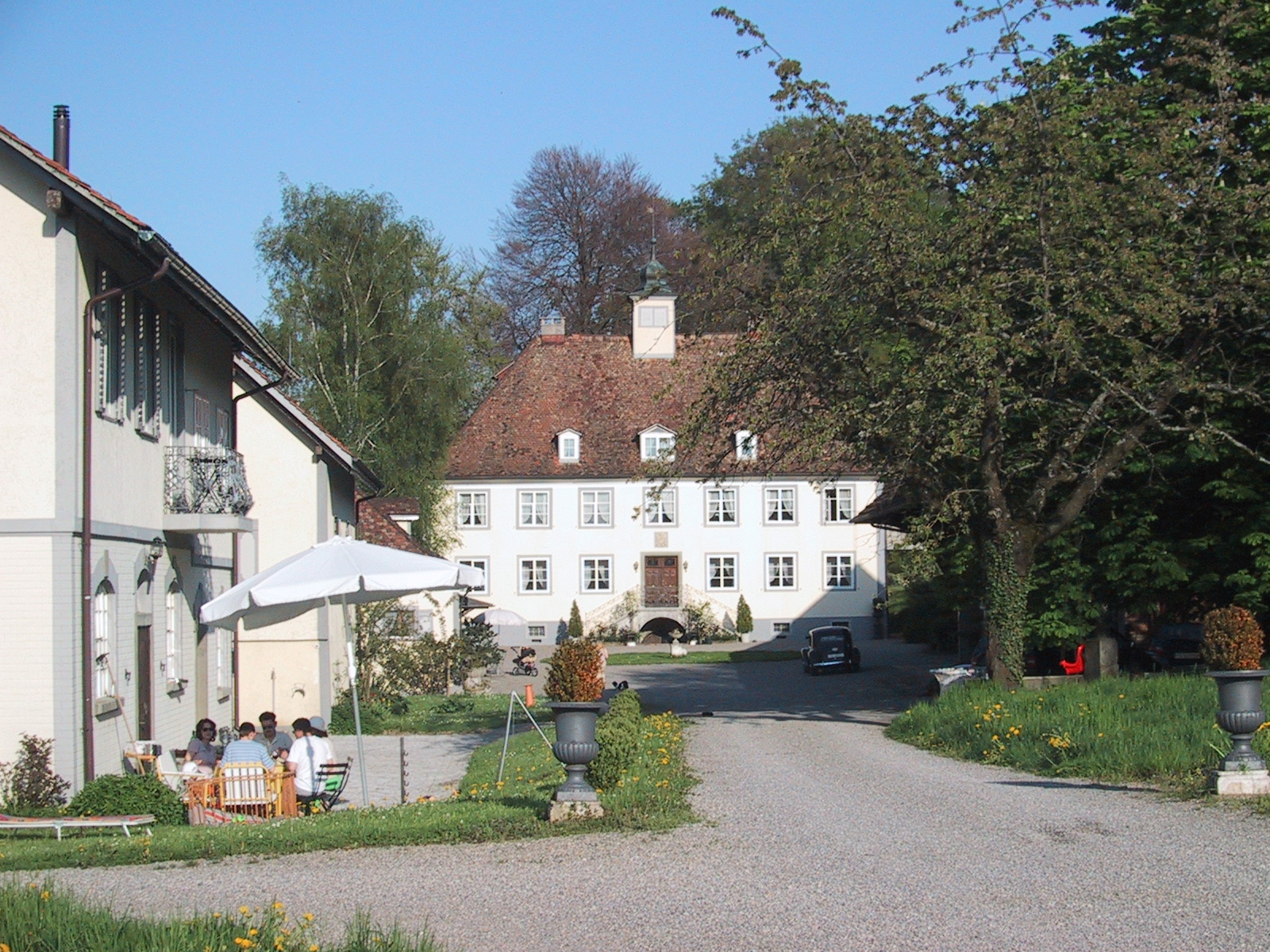 Schloss Girsberg im Ortsteil Emmishofen, Kreuzlingen